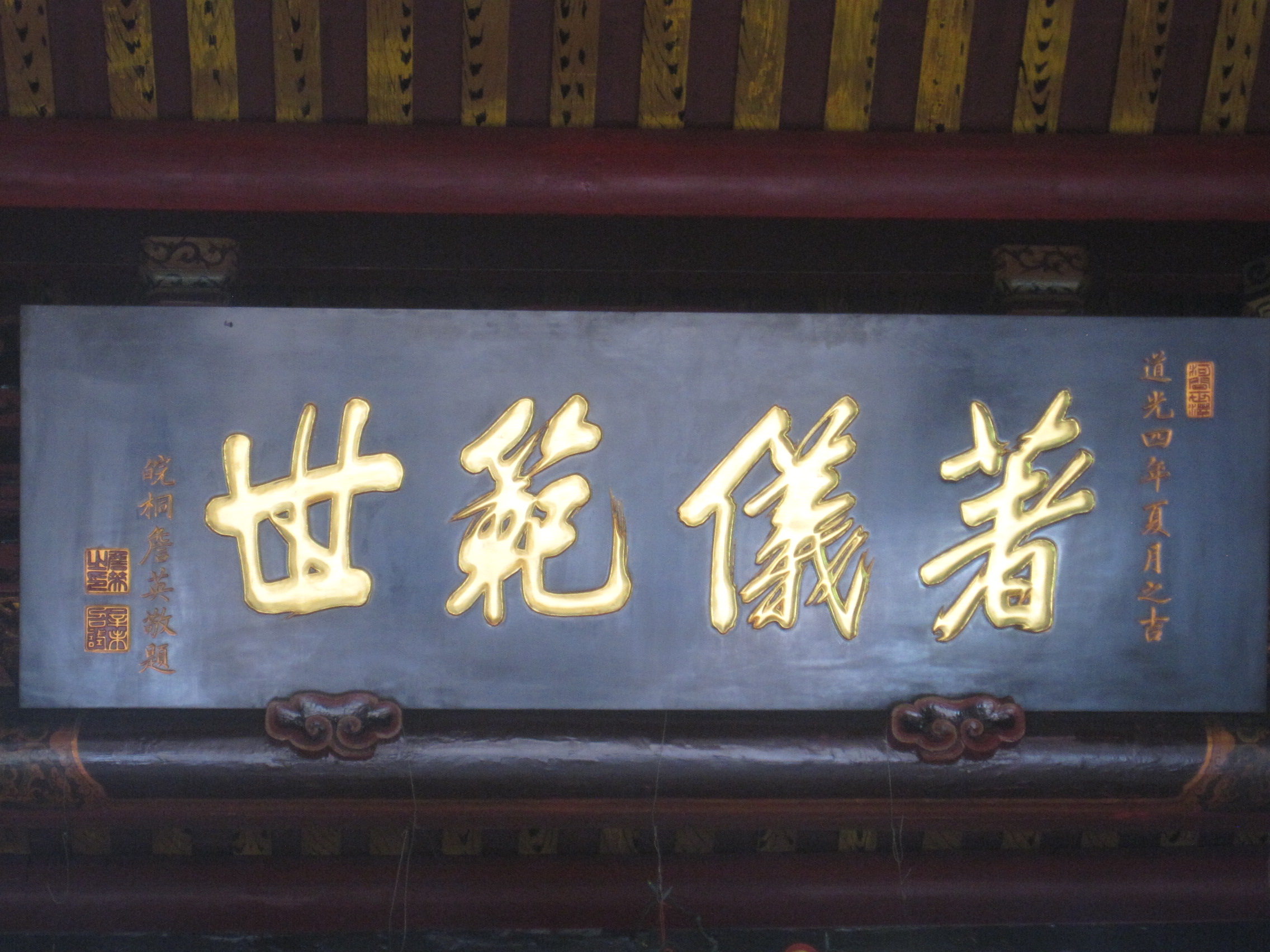 新莊文昌祠著儀範世匾